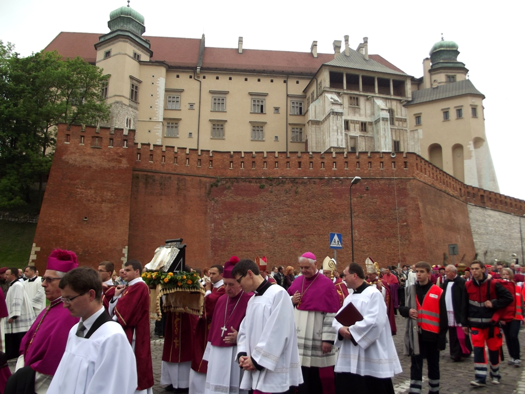 Zdjęcie zrobione podczas tradycyjnej procesji z Wawelu na Skałkę w Krakowie.